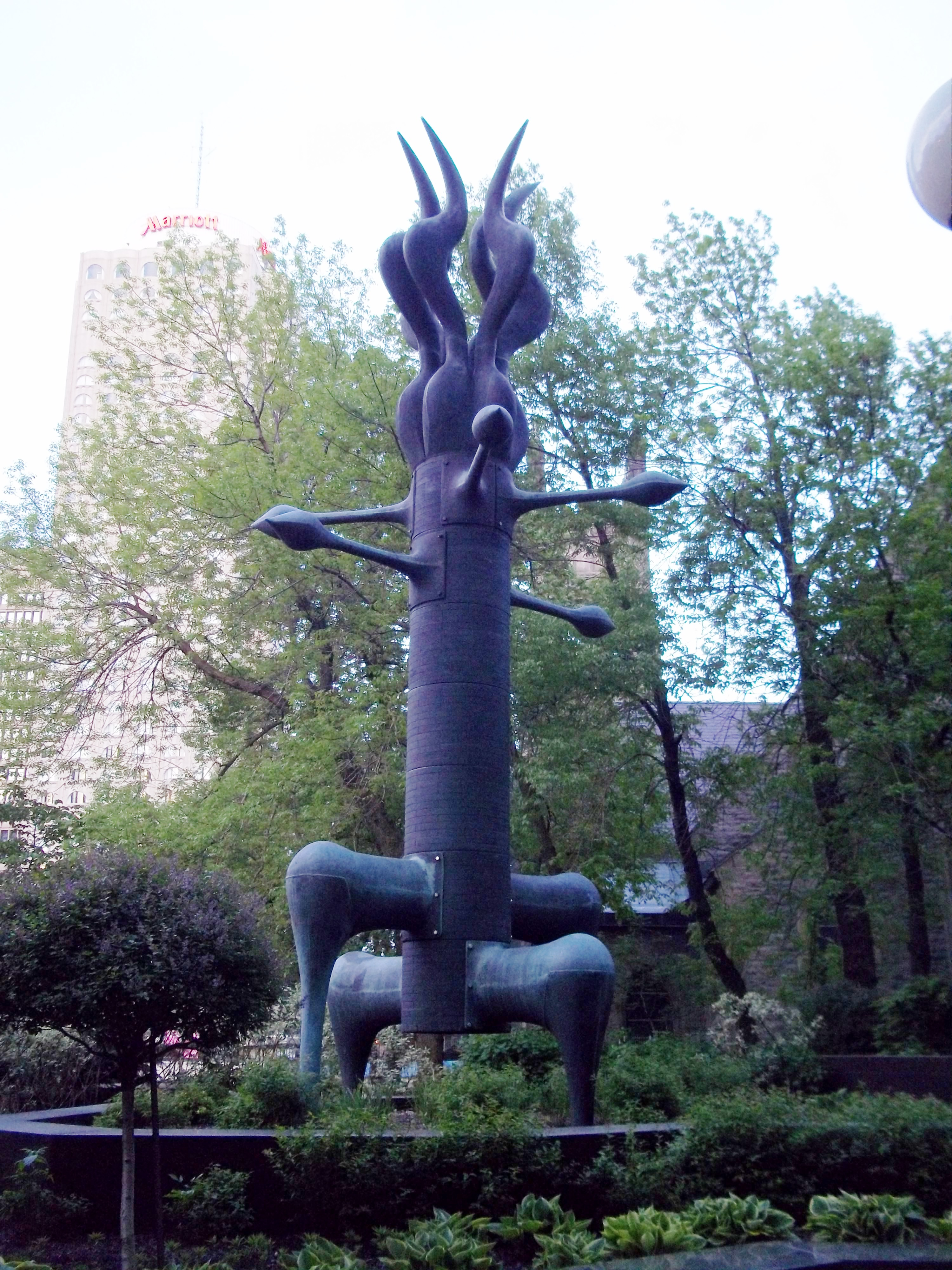 Cactus modulaire est une sculpture de Robert Roussil installée en 1986 dans la cour arrière donnant sur la rue Peel de l'édifice La Laurentienne, situé au 1100, boulevard René-Lévesque Ouest, à Montréal. L'œuvre est un assemblage de 29 pièces de bronze, d'une hauteur 10 m, commandée par la Société SNC Lavalin. Héritage Montréal